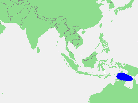 Arafura Sea